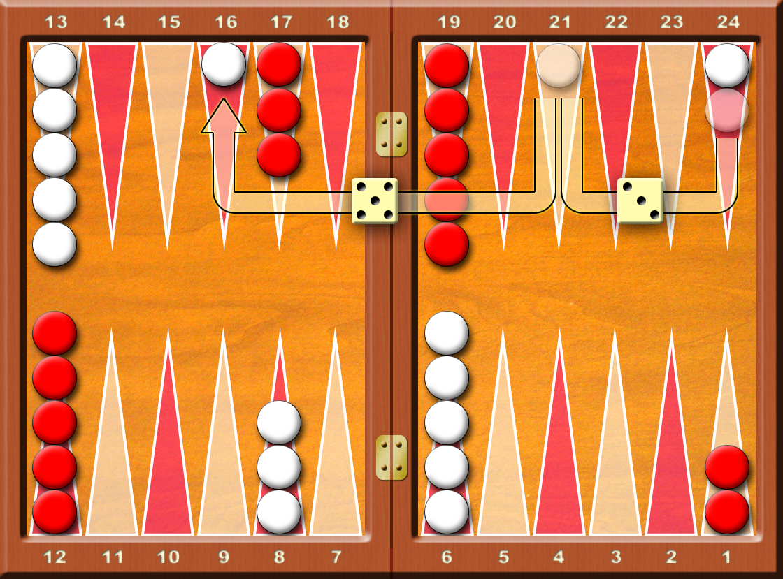 Backgammon--Dadi_5e3-Mossa con una sola pedina Francesco De Lorenzo (fr.dl CHIOCCIOLA tiscali.it) è l'autore di questa immagine e l'ha rilasciata sotto licenza GFDL